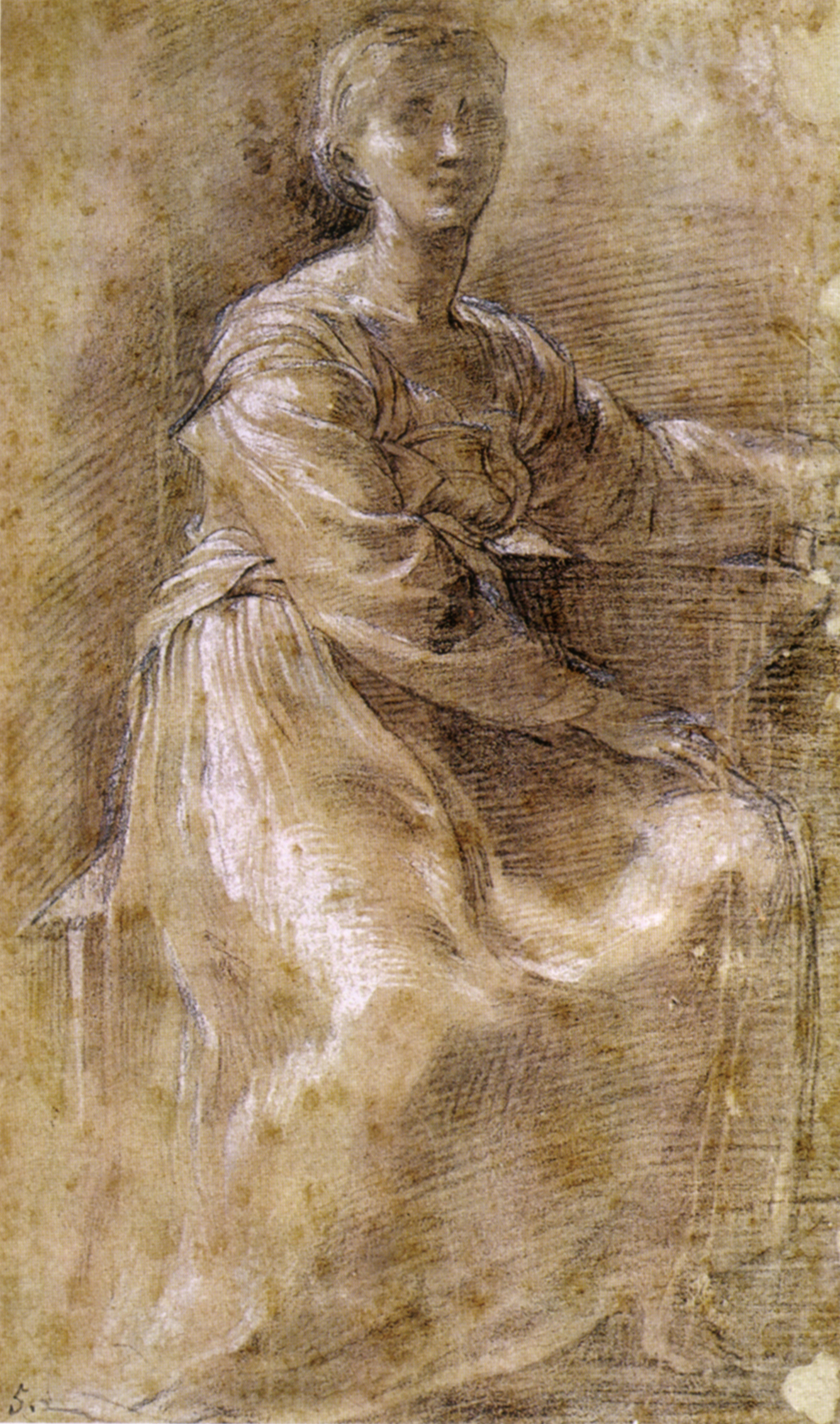 Donna seduta